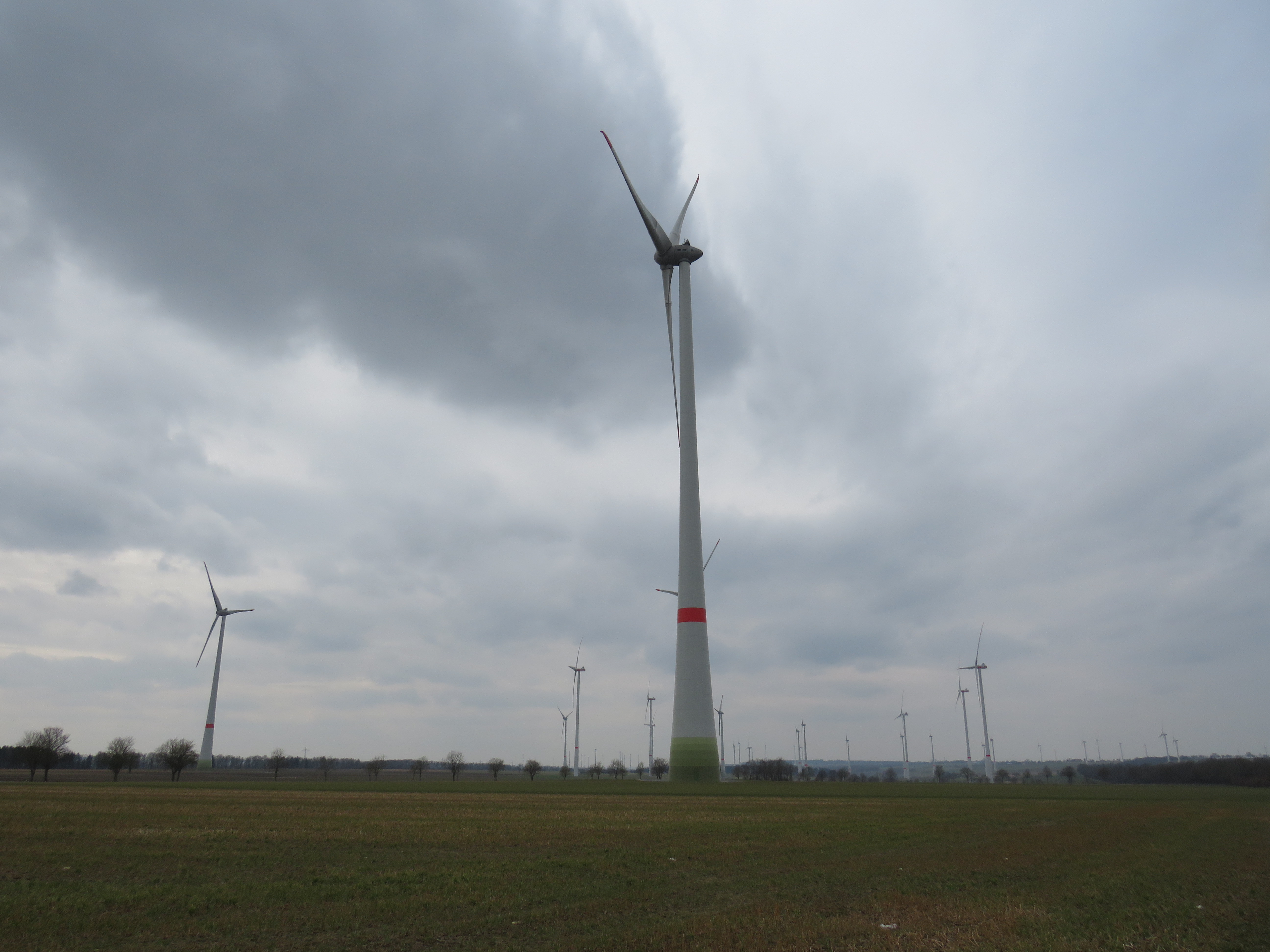 Windkraftanlagen im Windpark Eilerberg (Bad Wünnenberg, Kreis Paderborn, Nordrhein-Westfalen)